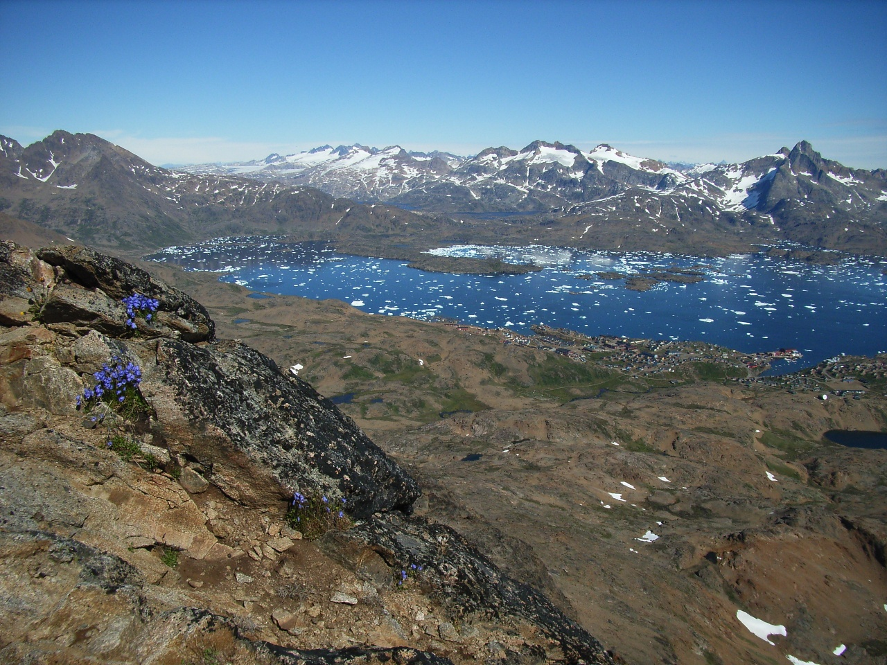 Blick vom Sømandsfjeldet auf den Kong Oskars Havn mit Tasiilaq